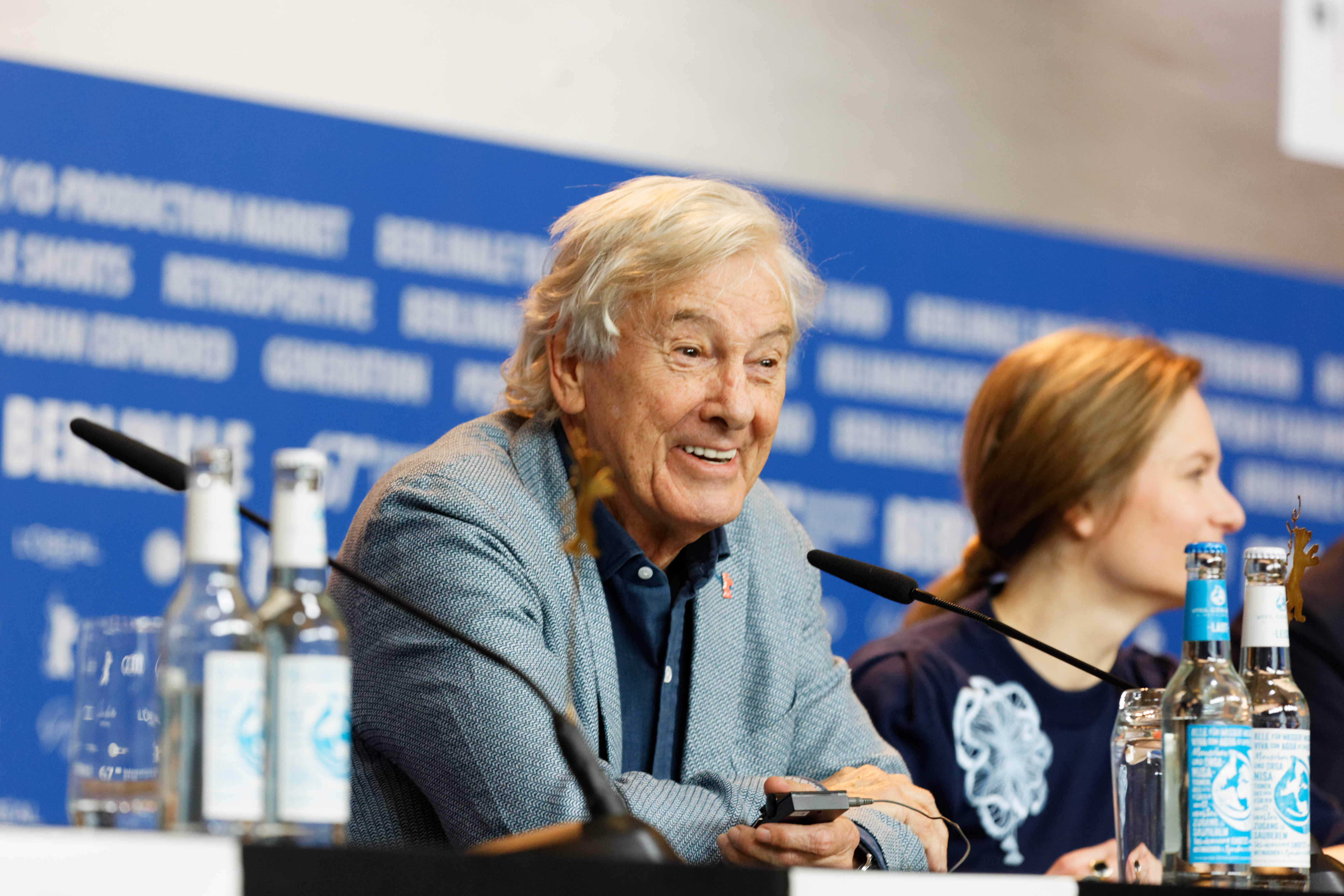 Paul Verhoeven bei der Pressekonferenz der Internationalen Jury zur Berlinale 2017